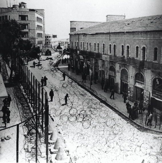 ירושלים - רח' יפו, "בוינגראד"